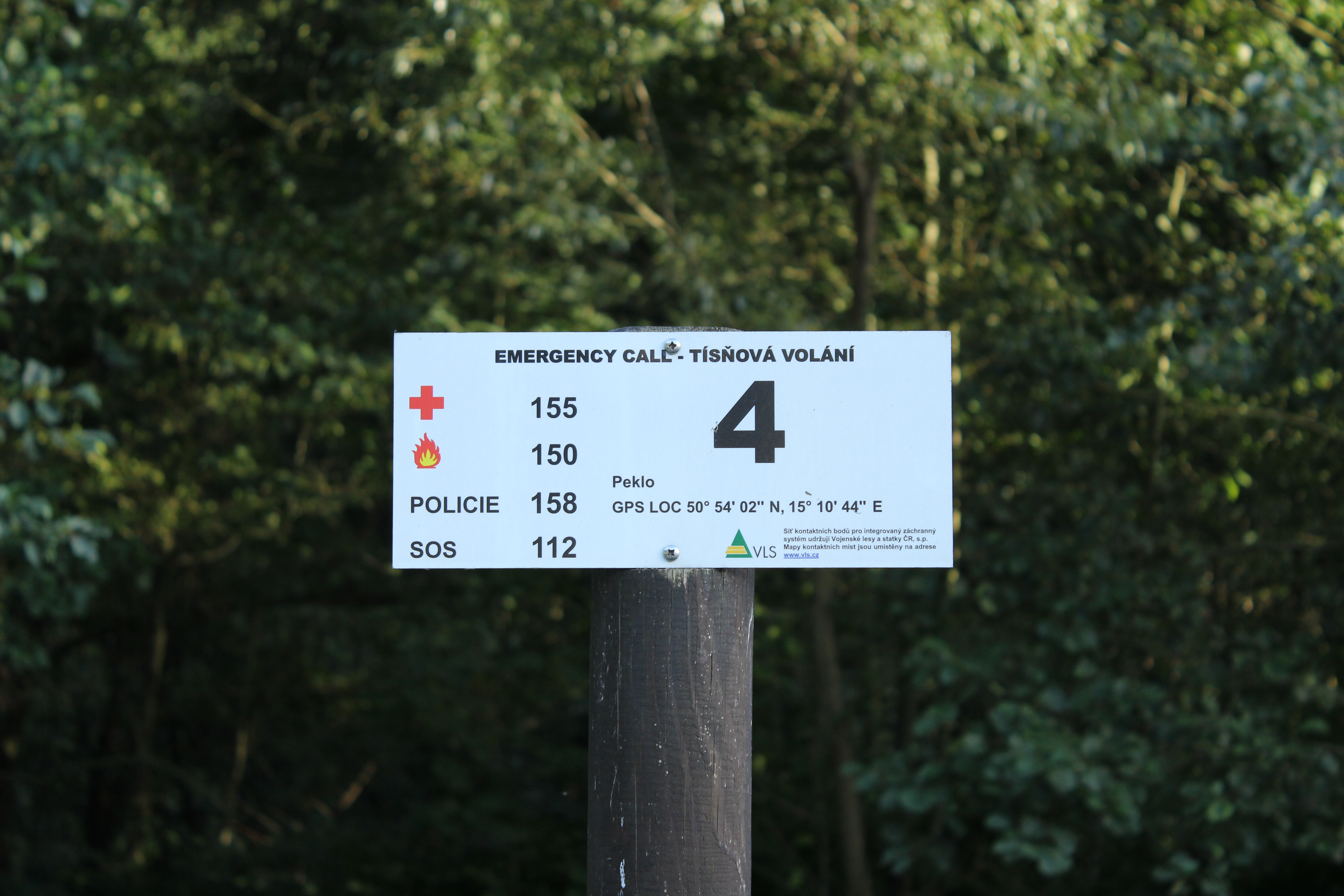 Trauma bod číslo 4 spravovaný Vojenskými lesy a statky ležící v Pekle, části Raspenavy.